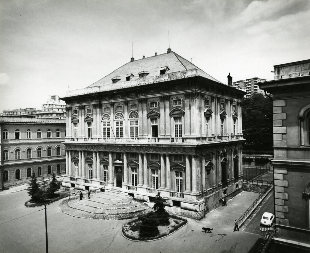 Genova-Sampierdarena. Villa Imperiale-Scassi detta La Bellezza, ora del Comune. Scuola Professionale,1560. Esterni. Facciata con gradinate Servizio fotografico : Genova, 1963 / Paolo Monti. - Stampe: 2 : Positivo b/n, gelatina bromuro d'argento/ carta, 24x30. - ((Al verso delle stampe manoscritti i numeri dei negativi corrispondenti: 6659, 6660 con iscrizioni didascaliche manoscritte a matita, e timbro a inchiostro con copyright: "© Copyright/ Credit to/ Paolo Monti/ Corso Sempione [...]/ Milano". - Sul coperchio della scatola iscrizione didascalica manoscritta a pennarello nero: "Genova e Liguria/ Città storiche". - Il negativo identificato con il numero 46397 è stato realizzato per Zodiac. - Occasione: Documentazione per la pubblicazione: Italia Nostra (a cura di), "Le ville genovesi", catalogo della mostra, Genova 1962, Genova, Comune di Genova, 1967. - Fonte: Monografia di Italia Nostra (a cura di): Le ville genovesi, catalogo della mostra, Genova 1962, Genova, Comune di Genova (1967). - Fonte: Lettera di Paolo Monti: I. Carteggi/ Genova - Enrico (1963-1966), presso Archivio Paolo Monti. Camicia con documenti dattiloscritti e manoscritti vari relativi al lavoro eseguito per Italia Nostra: preventivi, lettere, inventari. - Fonte: Rubrica di Paolo Monti: Archivio fino 1-4-1961/ 31-3-1963 (1961-1963), presso Archivio Paolo Monti. - Fonte: Agenda di Paolo Monti: R 1 - Monti/ 1 aprile 1963 - 6 giugno 1964/ 6000-8193 (1963-1964), presso Archivio Paolo Monti